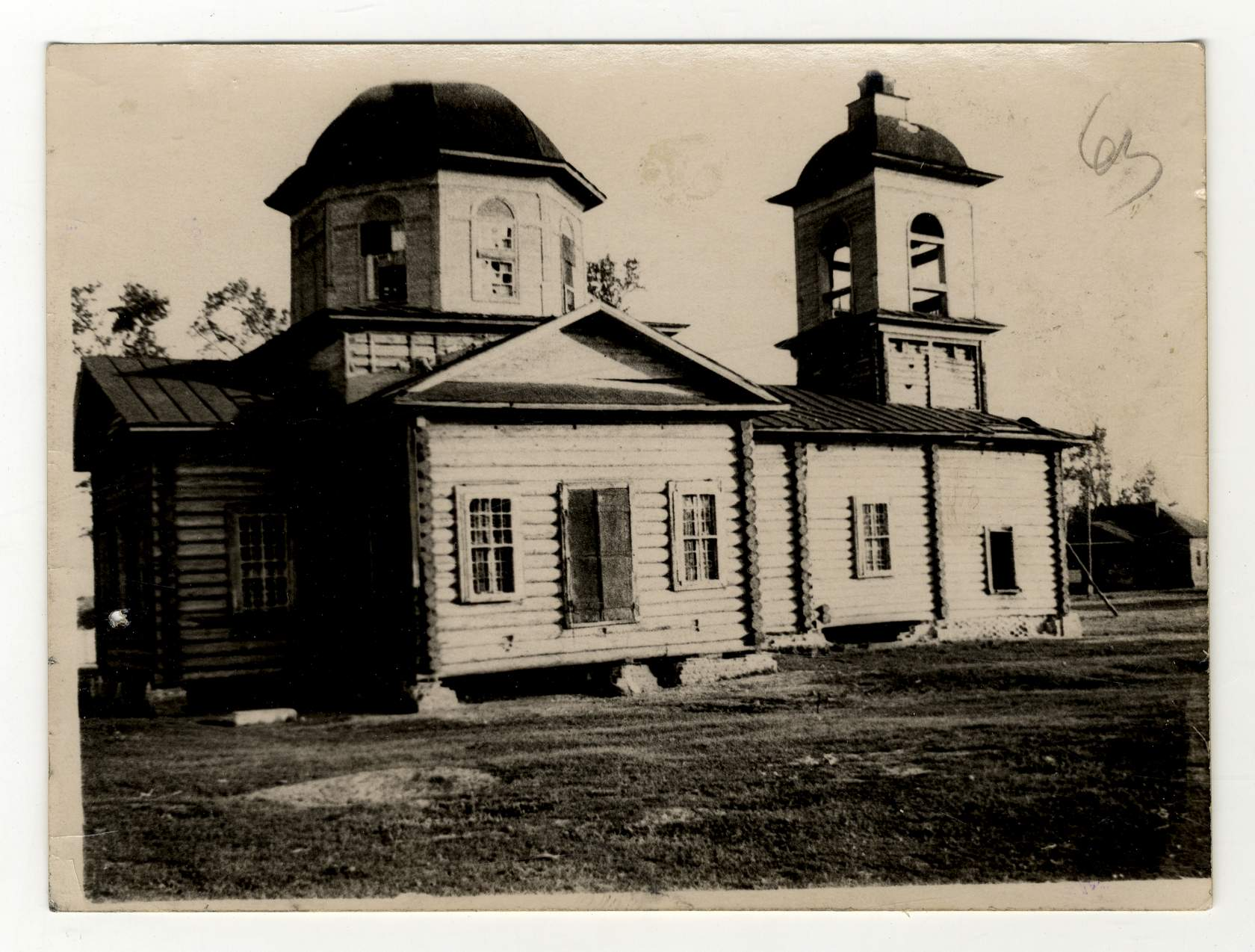 Храм Успения Пресвятой Богородицы в селе Чермные 2